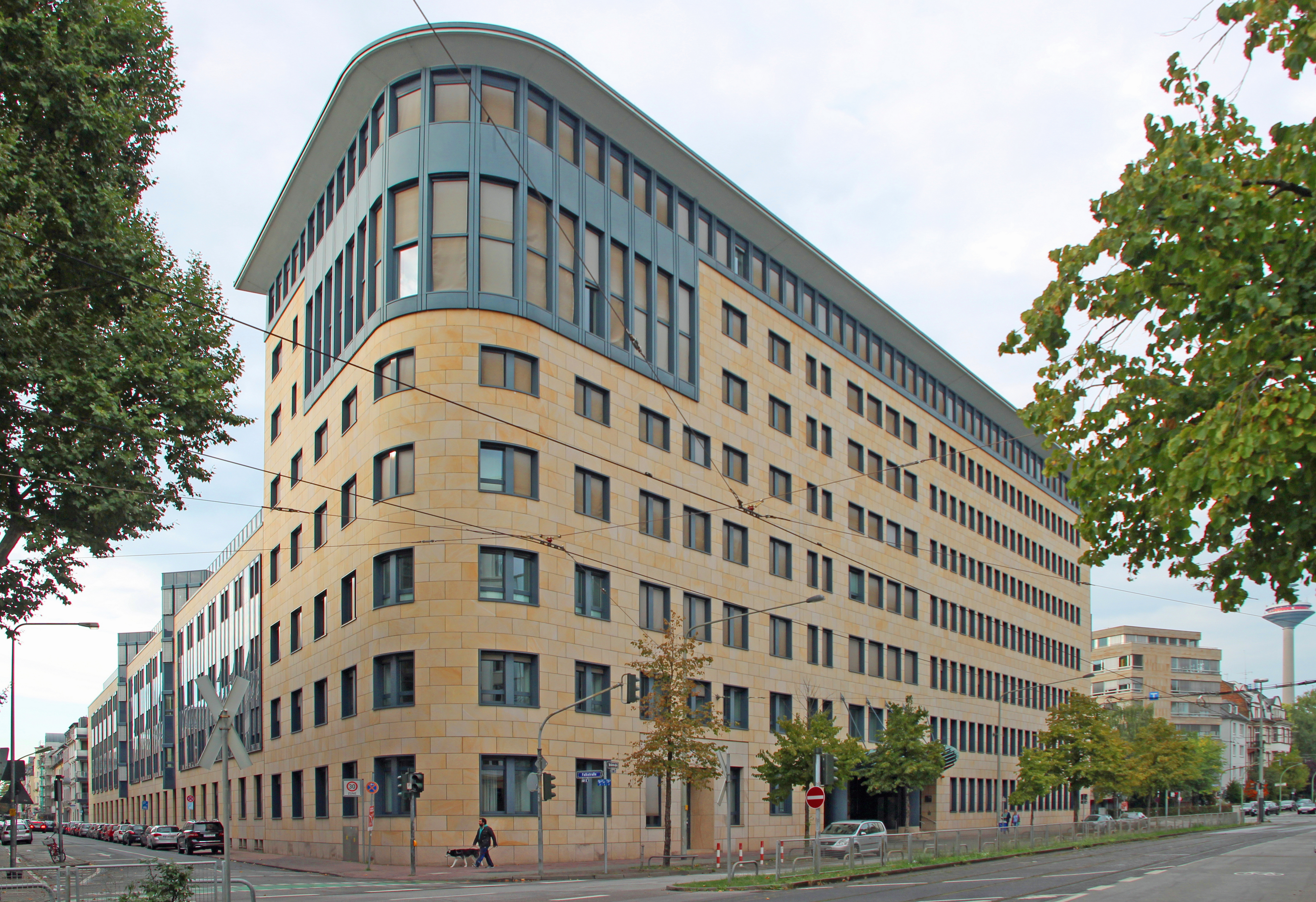 Bildinhalt: Ehemaliges Verwaltungsgebäude der Firma VDO Ecke Falk- und Gräfstraße. Rechts im Hintergrund der "Ginnheimer Spargel" Aufnahmeort: Frankfurt am Main, Deutschland